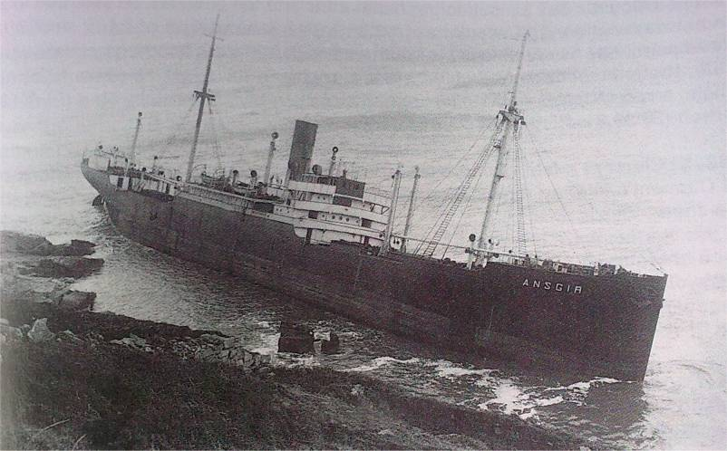 Die ‚Ansgir‘ der Roland-Linie auf den Klippen von Penzer Point, Lamorna Cove c. 50°04′12″N 5°32′30″W / 50.07°N 5.54167°W